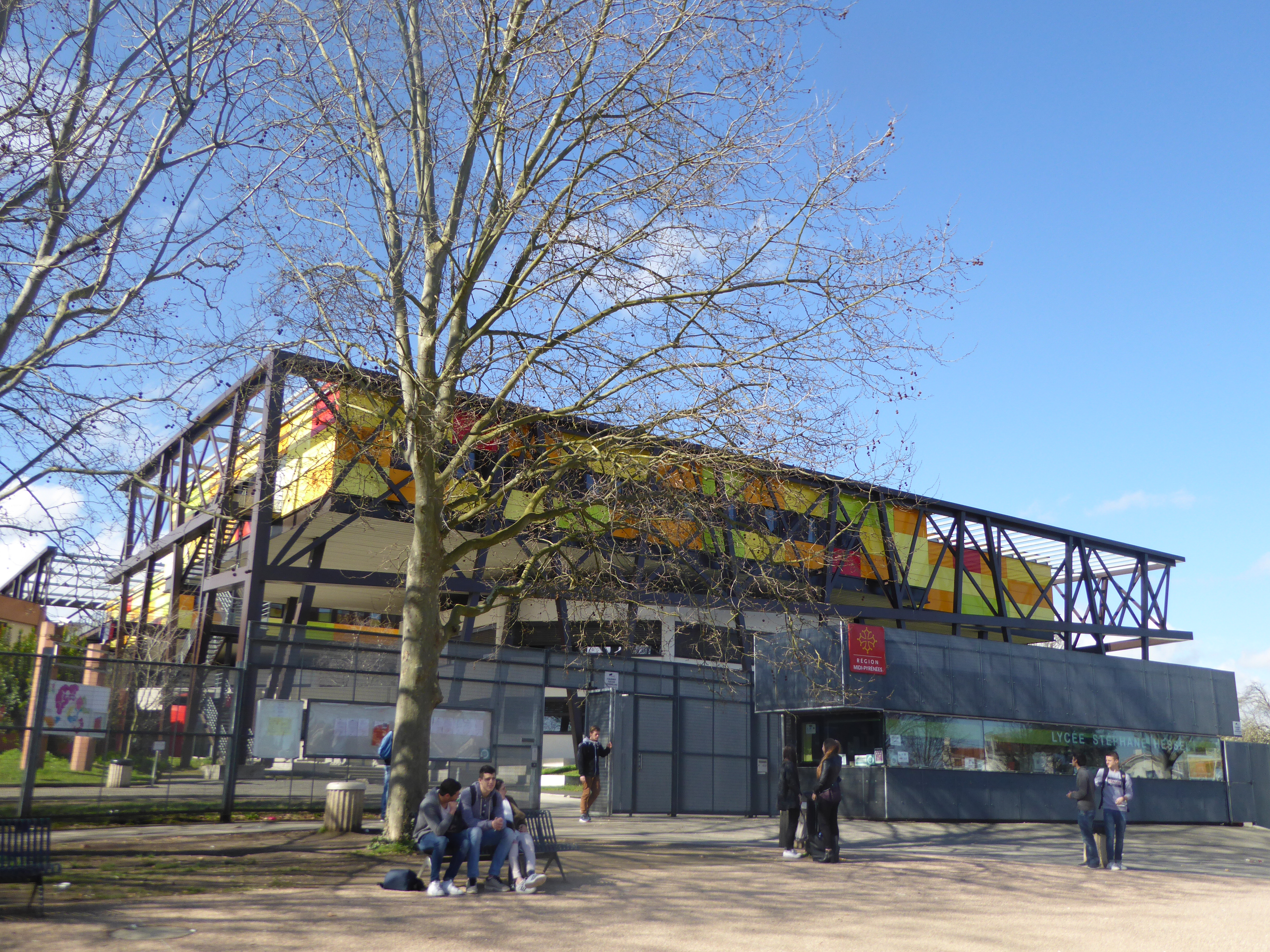 Lycee Stephane Hessel (Toulouse) : entrée générale